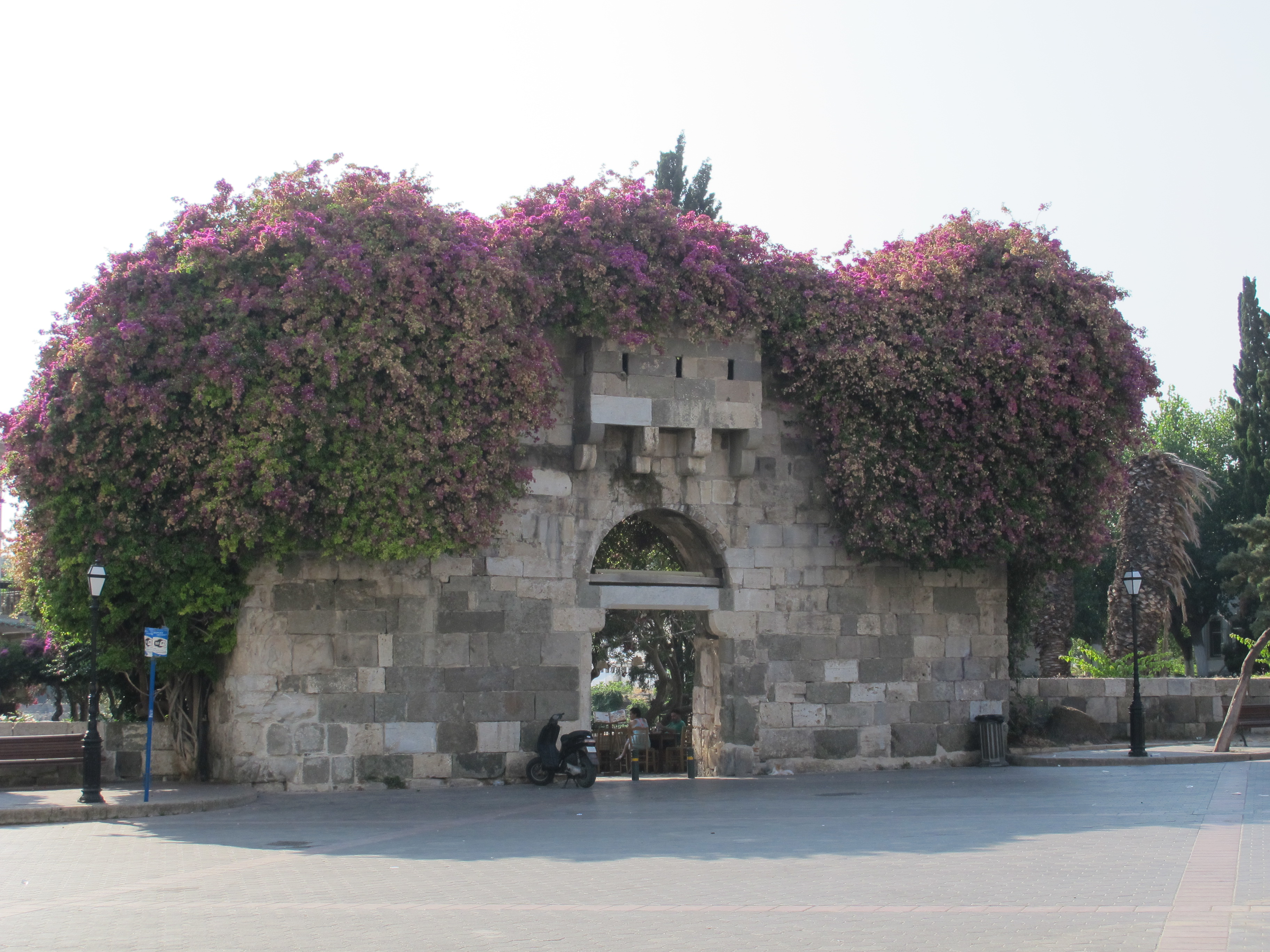 Kos città, porta